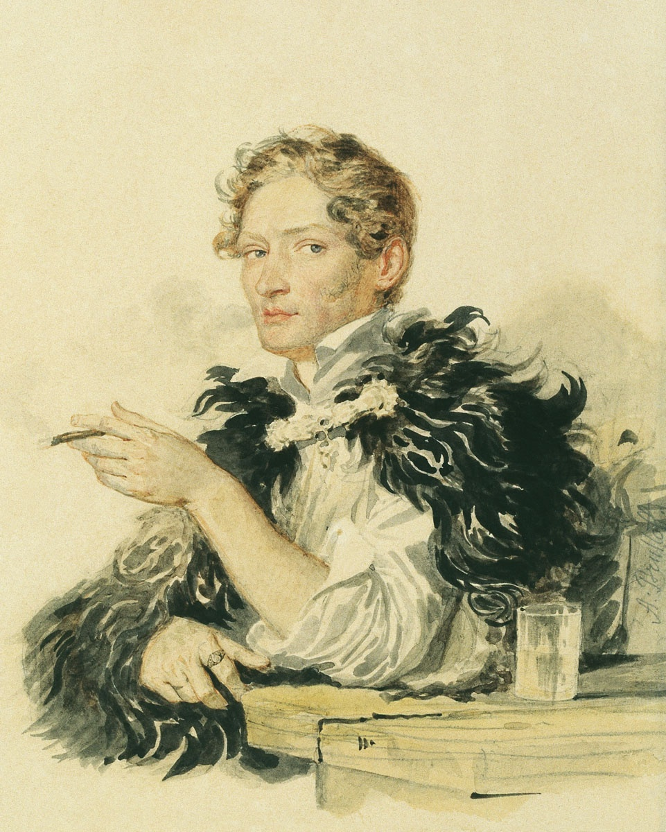 Antony Pogorelsky by Brullov